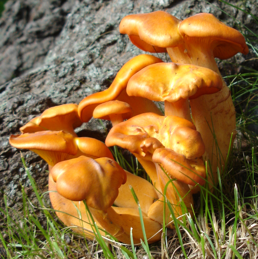 Dunkler Ölbaumtrichterling (Omphalotus olearius)